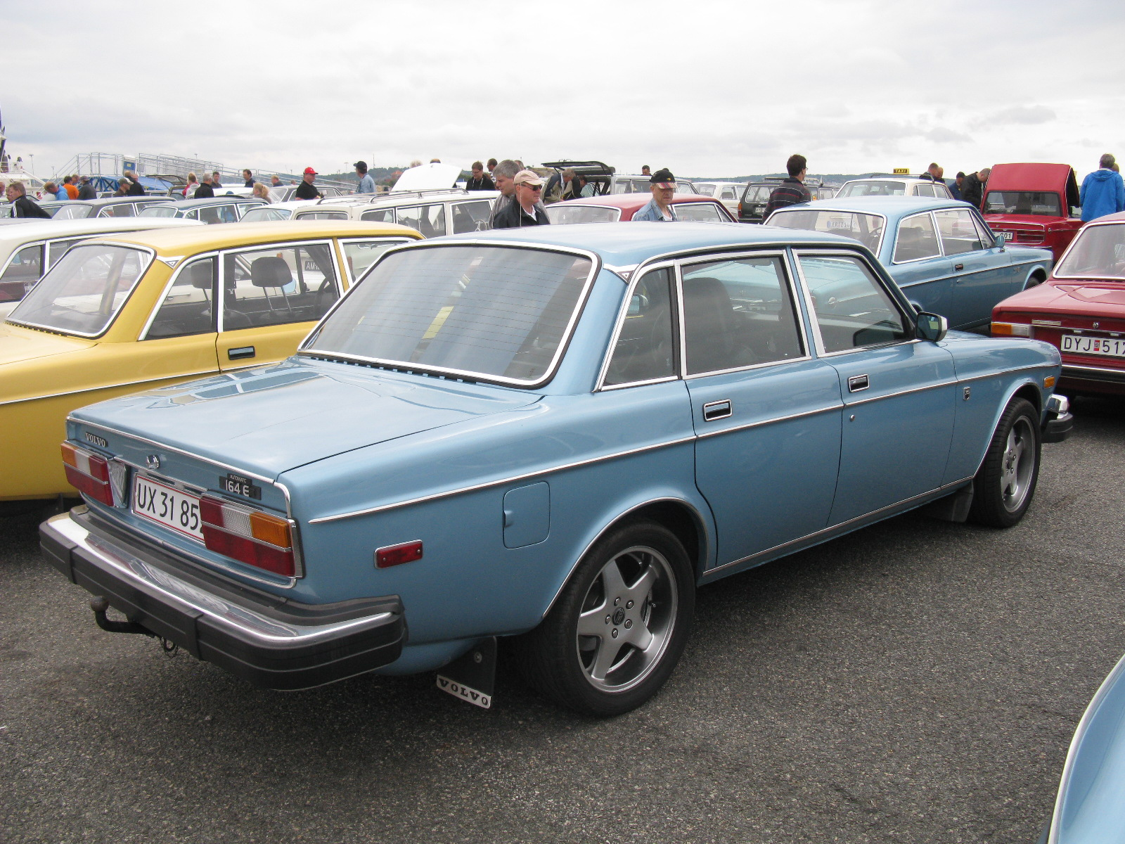 Volvo 164 E